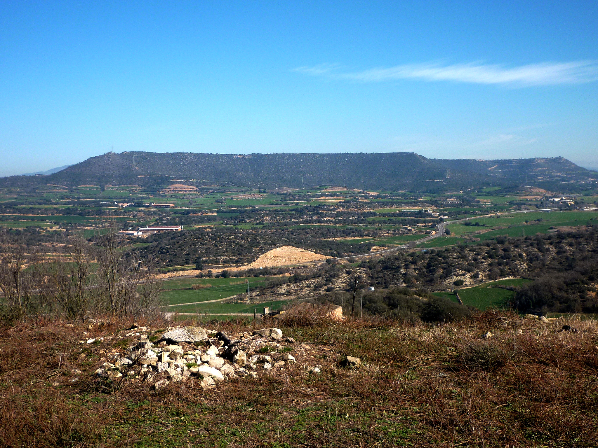 Altiplà de la Força amb el castell de Grialó a l'esquerra (Artesa de Segre) i la Torre del Cargol a la dreta (Ponts). Des de Tudela de Segre